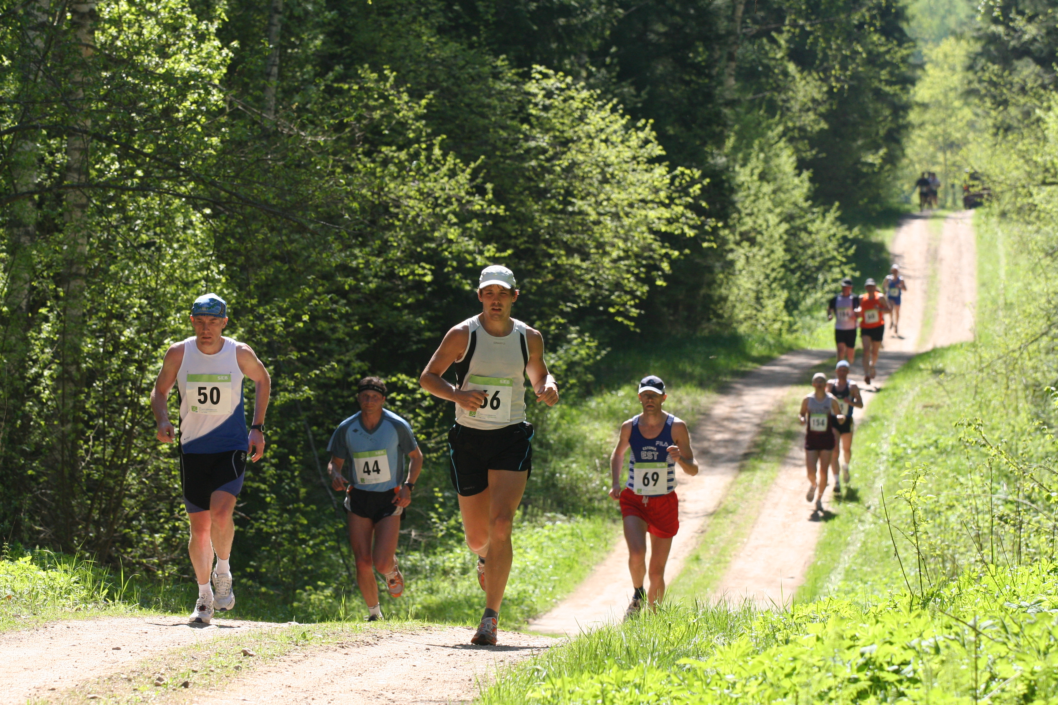 Tartu Jooksumaraton 2008. aastal